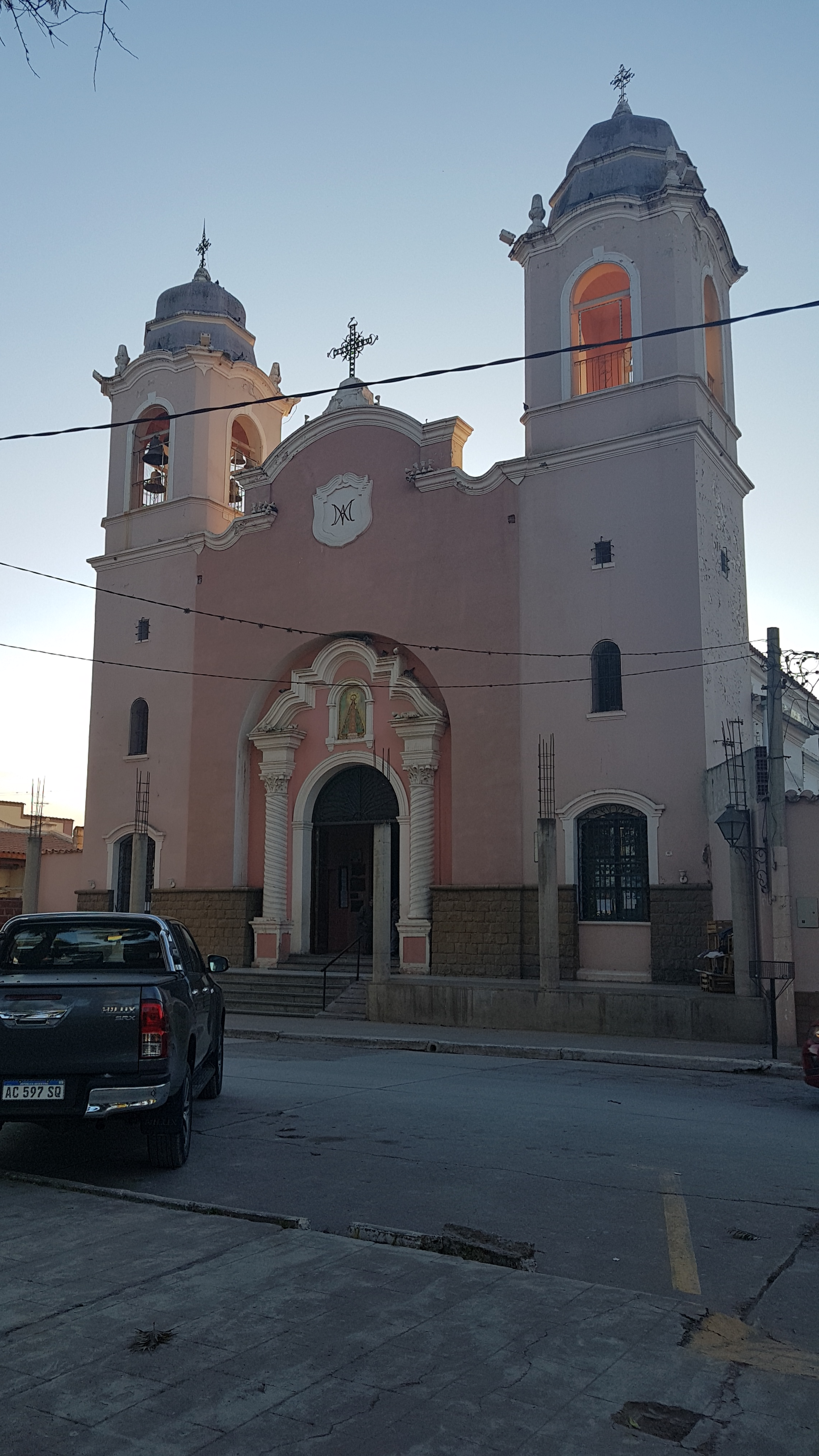 Construida antiguamente en el siglo XVIII, en esta capilla, dedicada a Nuestra Señora del Rosario, se congregaron los primitivos pobladores de Rosario de Lerma y de ella recibieron su primer hálito de fe cristiana y su primer impulso a una vida social organizada. El pueblo tomo como propio el nombre de la Patrona de la capilla: Rosario. Presenta su recientemente remodelado altar que es toda una obra de arte: en la parte inferior una réplica del baldaquino de la catedral de San Pedro, en Roma. Está sostenido por cuatro columnas salomónicas, en el centro, a la sombra del baldaquino, se encuentra la imagen del Señor del Milagro y en la parte superior de las columnas se presentan cuatro ángeles custodios que miran hacia los cuatro puntos cardinales. La coronación simboliza la cúpula de la Basílica de San Pedro, Cabeza de la Iglesia Universal. El mural del Altar Mayor es obra de artistas rosarinos, representa “Los cuatros Jinetes del Apocalipsis” de la Biblia. En el costado derecho del Mural se representa el mal y la perdición del hombre, mientras que en el izquierdo el Bien y su redención. El interior del sagrado recinto alberga las Imágenes de la Sta. Patrona, del pueblo, La Virgen del Rosario y la Virgen Gaucha. También se destacan un cuadro de San Héctor Valdivieso, primer Santo argentino; la Imagen de la Virgen Dolorosa, que es una réplica de nuestra Sra. De la Esperanza “La Macarena” de Sevilla; Justo Juez tallado en madera, el cuerpo es de un árbol de olivo traído del Huerto de Getsemaní (Monte de Los Olivos); Jesús bajado de la Cruz, una imagen articulada realizada en madera.fachada de iglesia